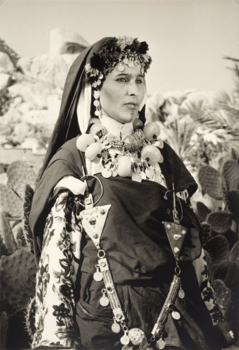 Foto van een professionele fotograaf, werd in grote aantallen verkocht. Op de achterkant van deze prentbriefkaart staat gedrukt "nr. 828. Photos editions Art-Maroc-Rabat 6, Impasse Van-Vollenhoven".